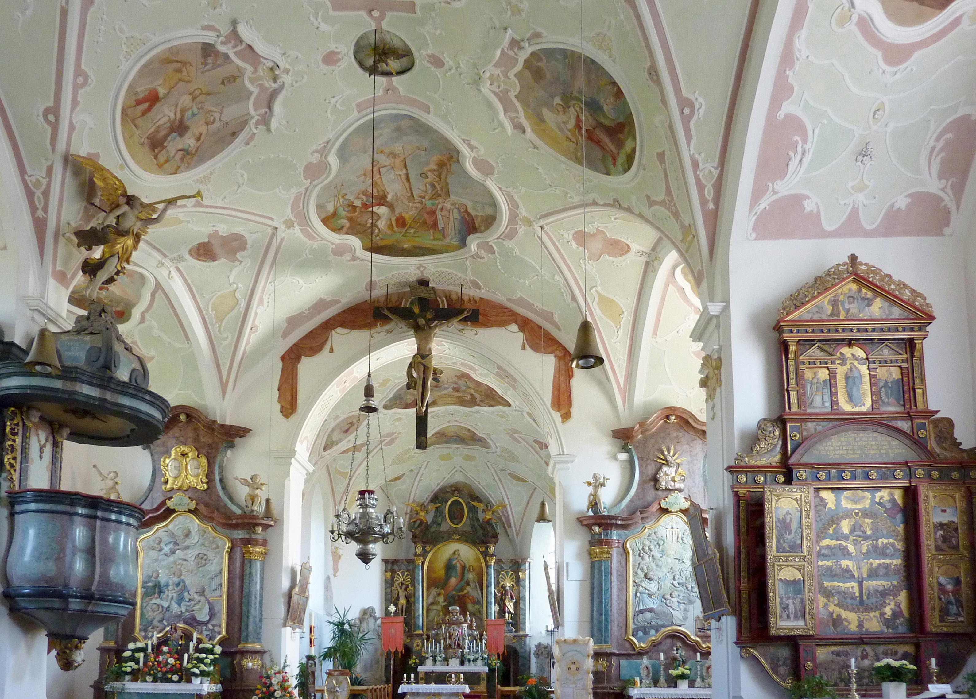 Katholische Pfarrkirche Mariä Himmelfahrt in Hochaltingen, einem Ortsteil von Fremdingen im Landkreis Donau-Ries (Bayern), Innenraum